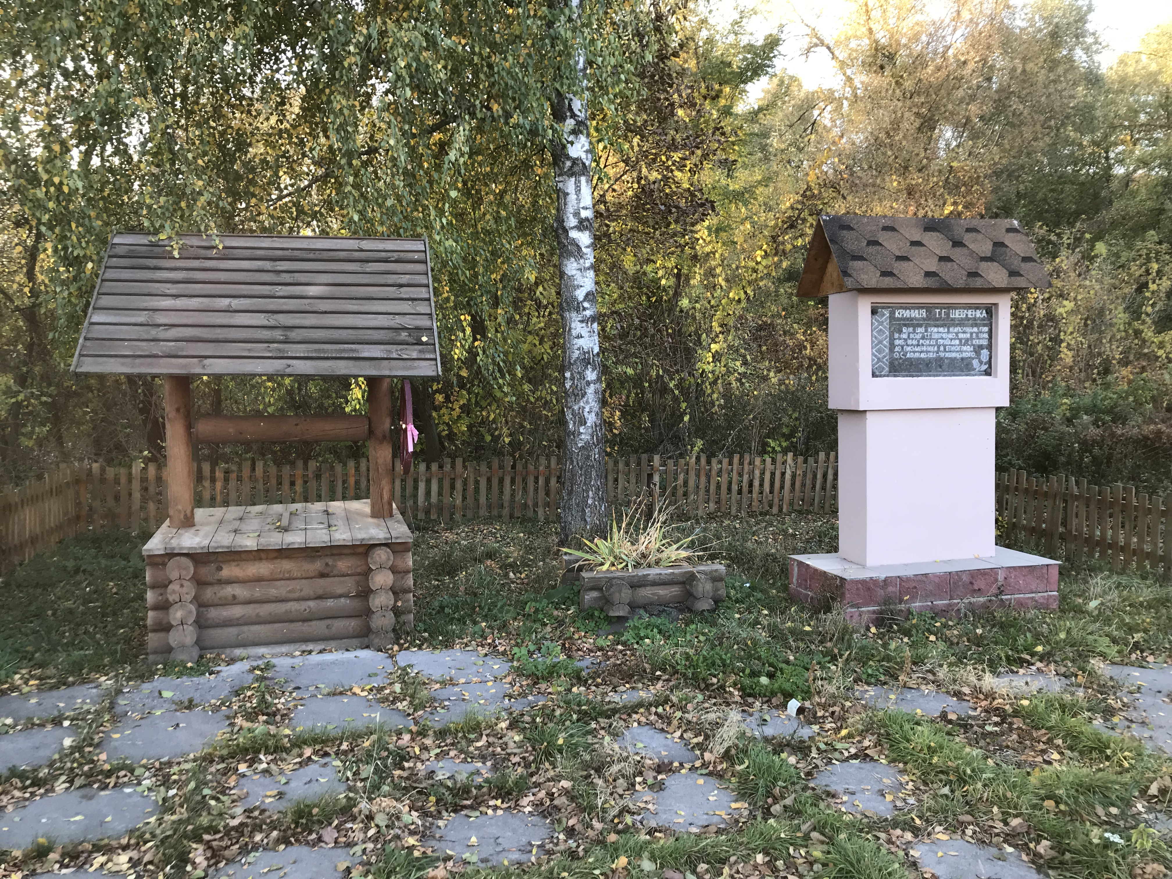 Криниця Т.Г. Шевченка. Біля неї відпочивав та пив з неї Т.Г. Шевченко у 1843, 1845, 1846 роках